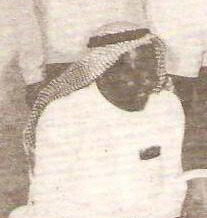 Abdullah Abdulmajed